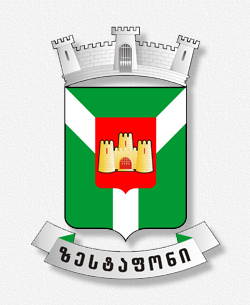 ზესტაფონის მუნიციპალიტეტის გერბი